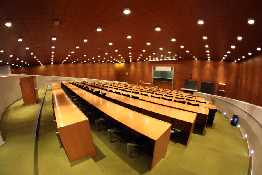 Rathaus der Stadt Mainz. Hier: Hörsaal